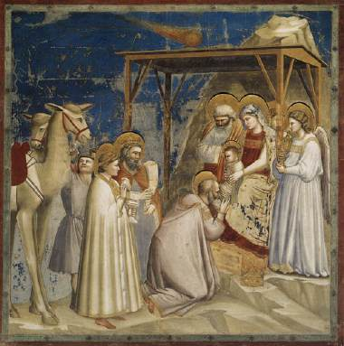 Krippenbild